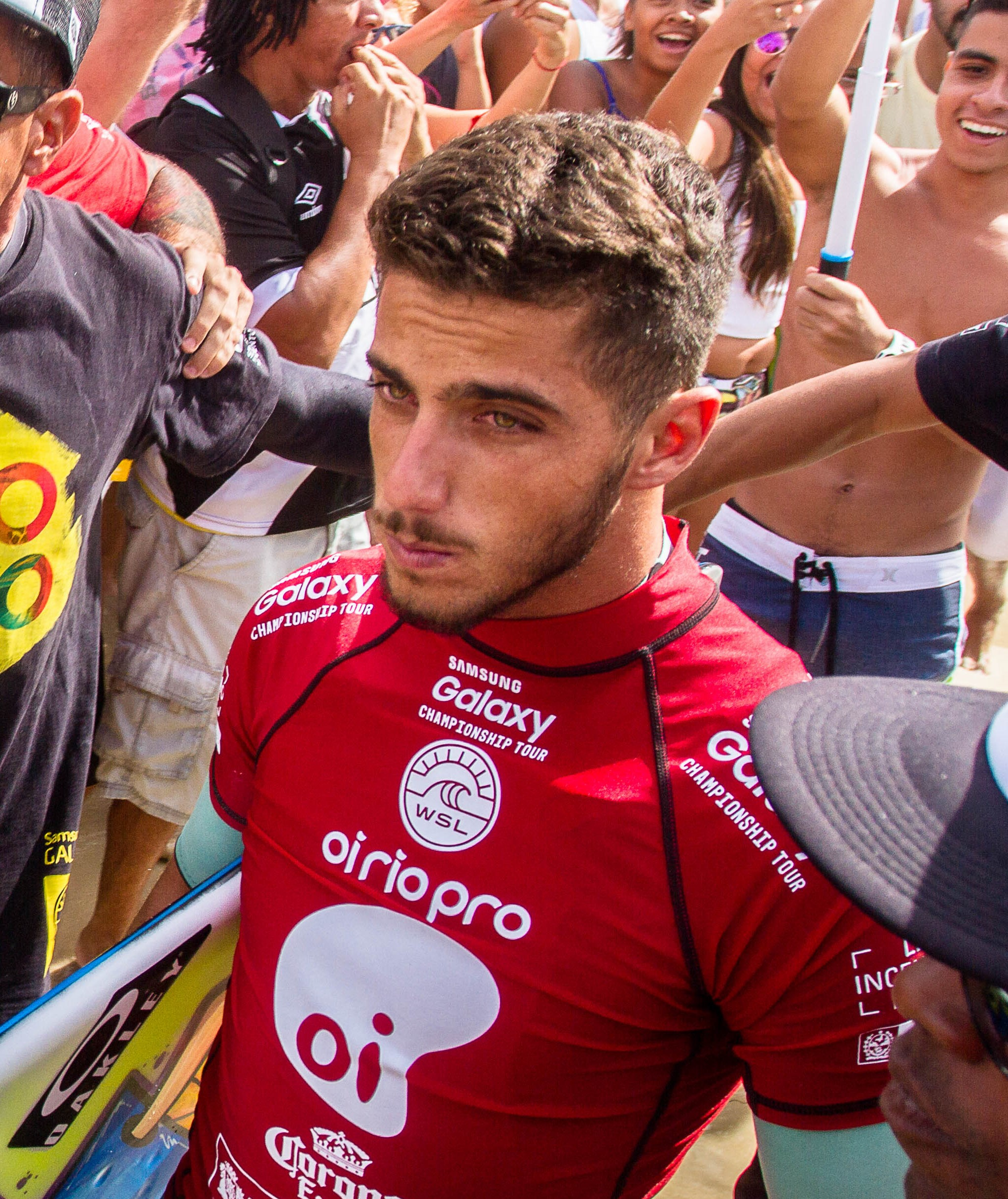 Filipe Toledo lors du Oi Rio Pro 2015 à Rio de Janeiro (Brésil)